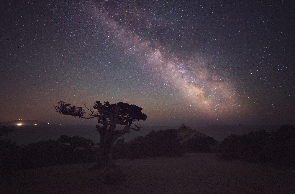 Новий Світ, м. Судак, Судакське л-во кв.42-46,67